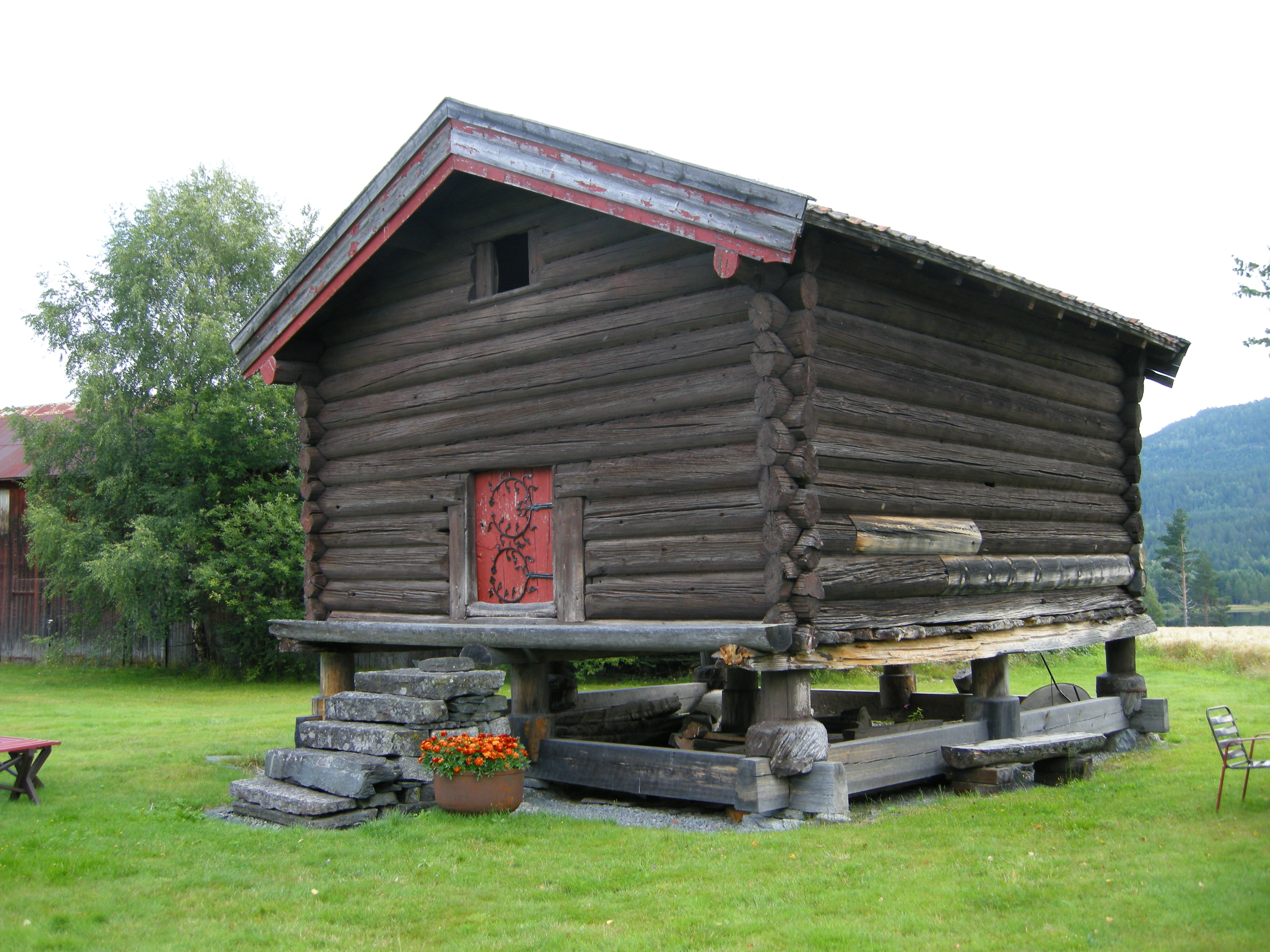 Findalslaft - Alfstadloftet i Rollag